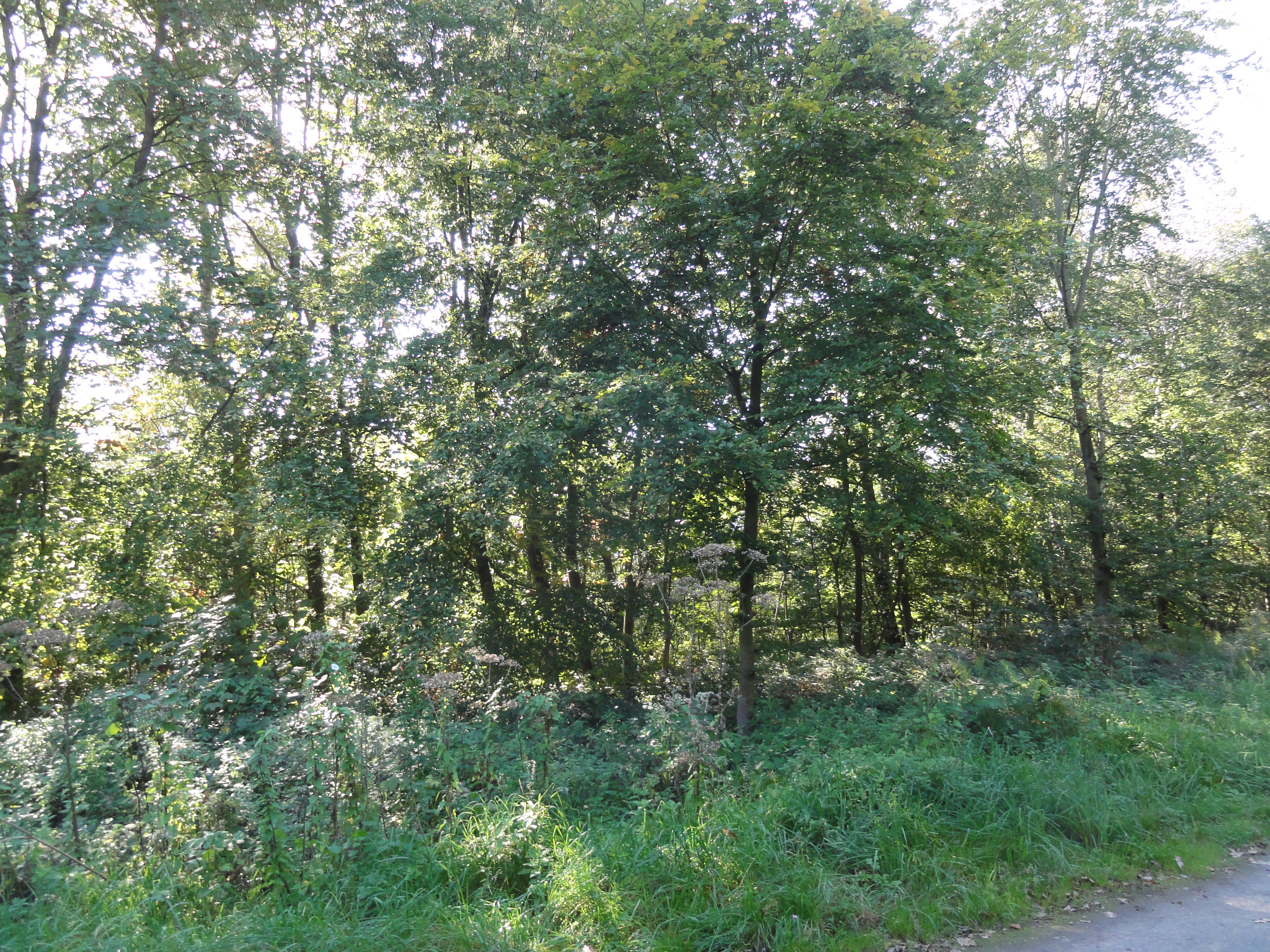 Terril n° 257 dit Sablière du Pinson, disparu, Compagnie des mines d'Anzin, Raismes, Nord, Nord-Pas-de-Calais, France.